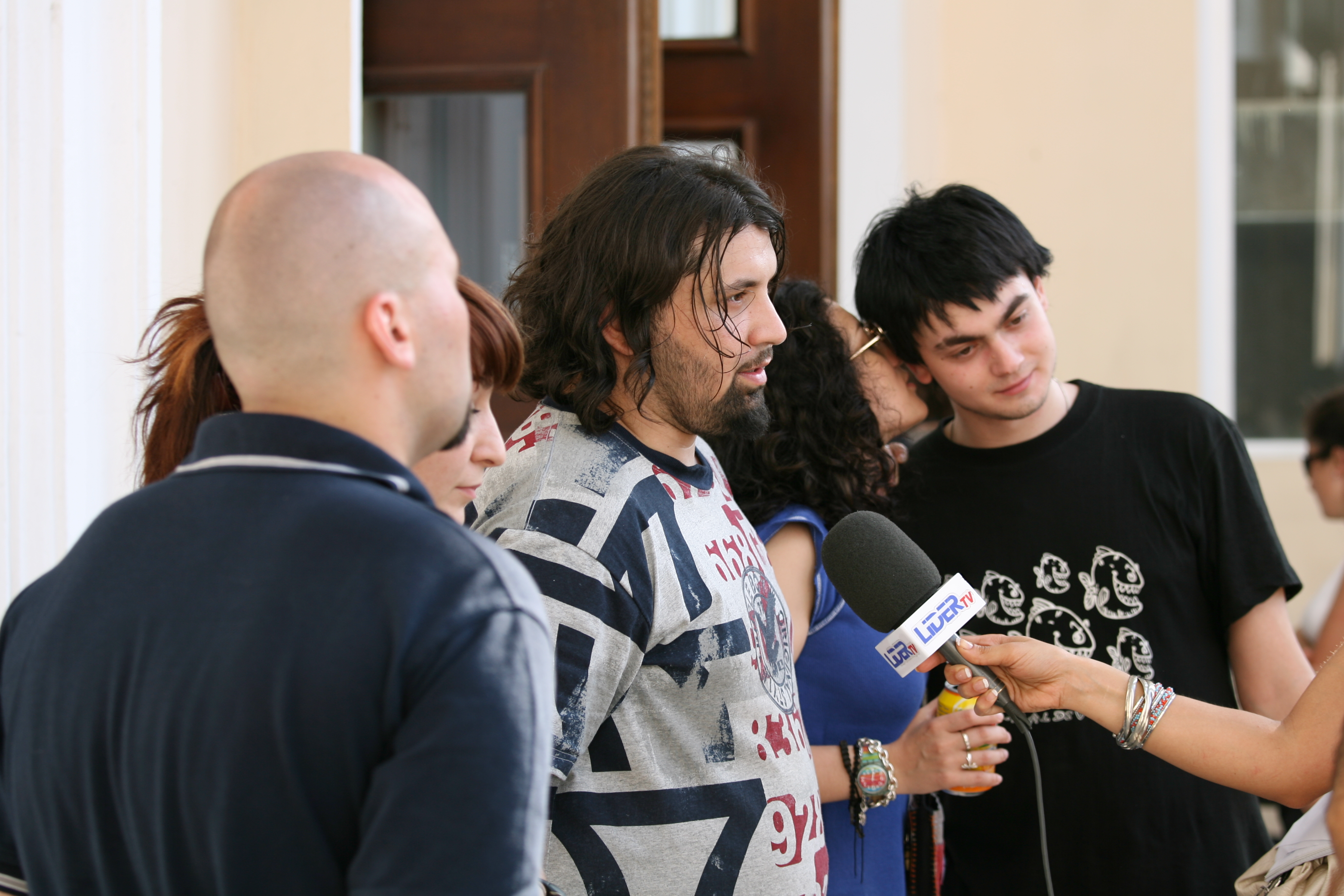 Unformal - интервью перед выступлением. 2007 год